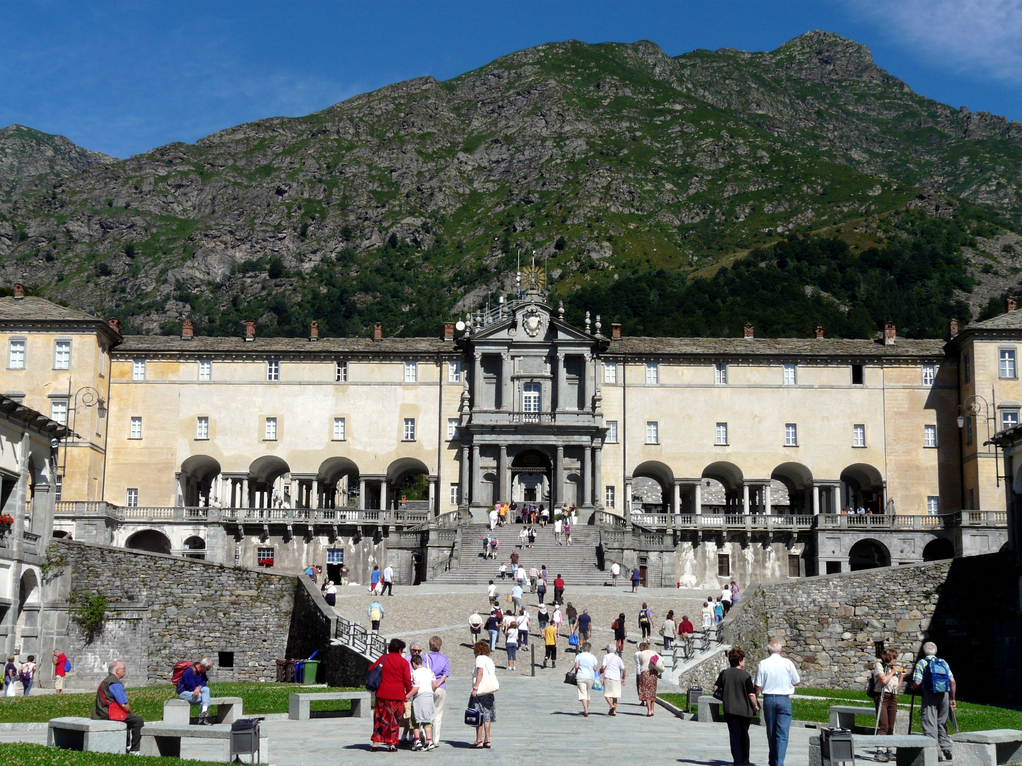 Serie di immagini del Santuario di Oropa, Piemonte, Italia